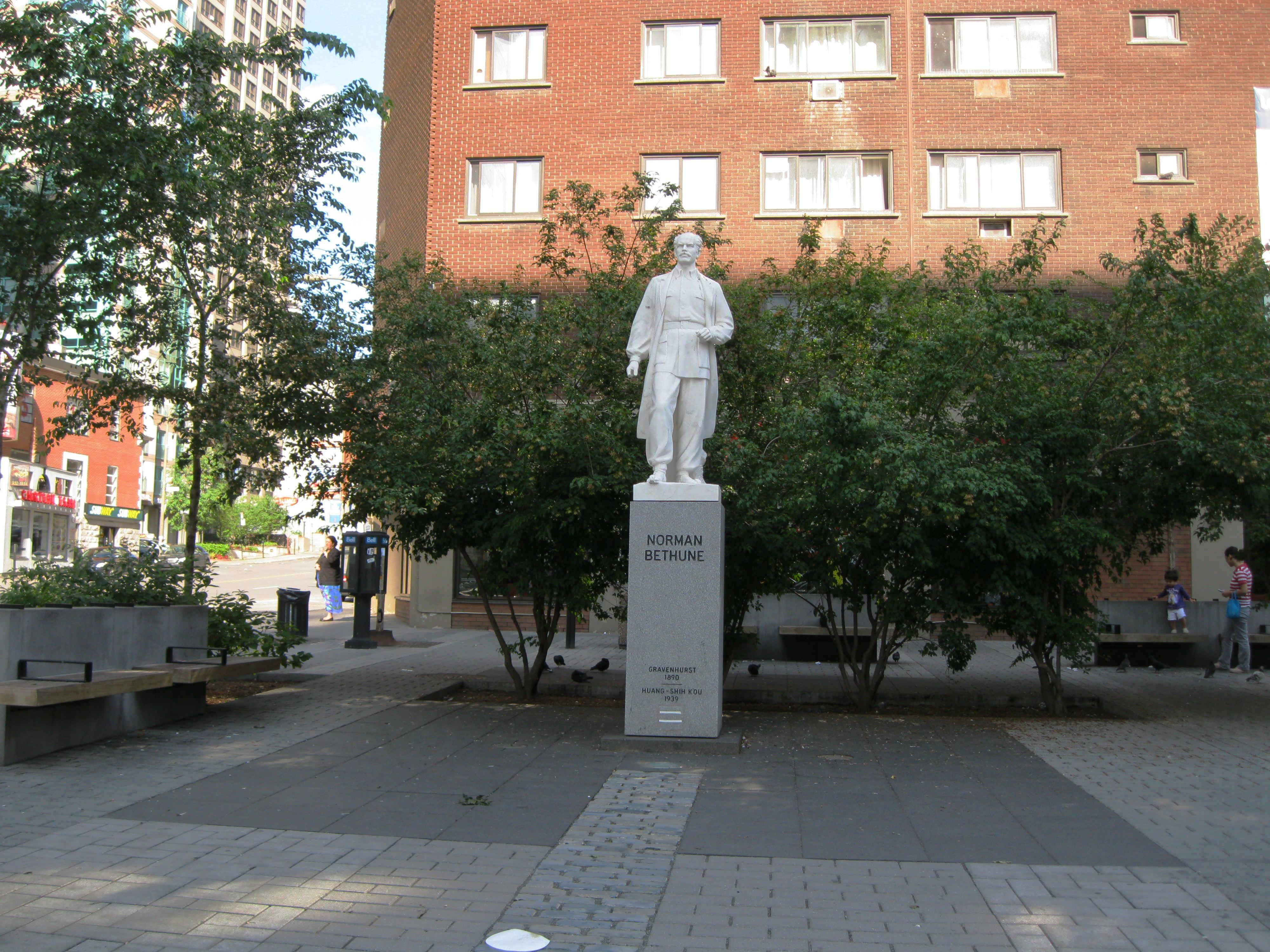 Place Norman-Bethune à Montréal, à l'est de la rue Guy et au nord du boulevard de Maisonneuve